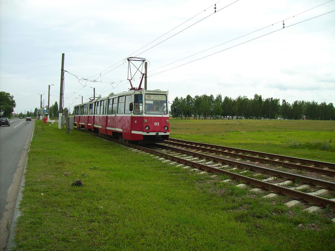 Мазырскі трамвай